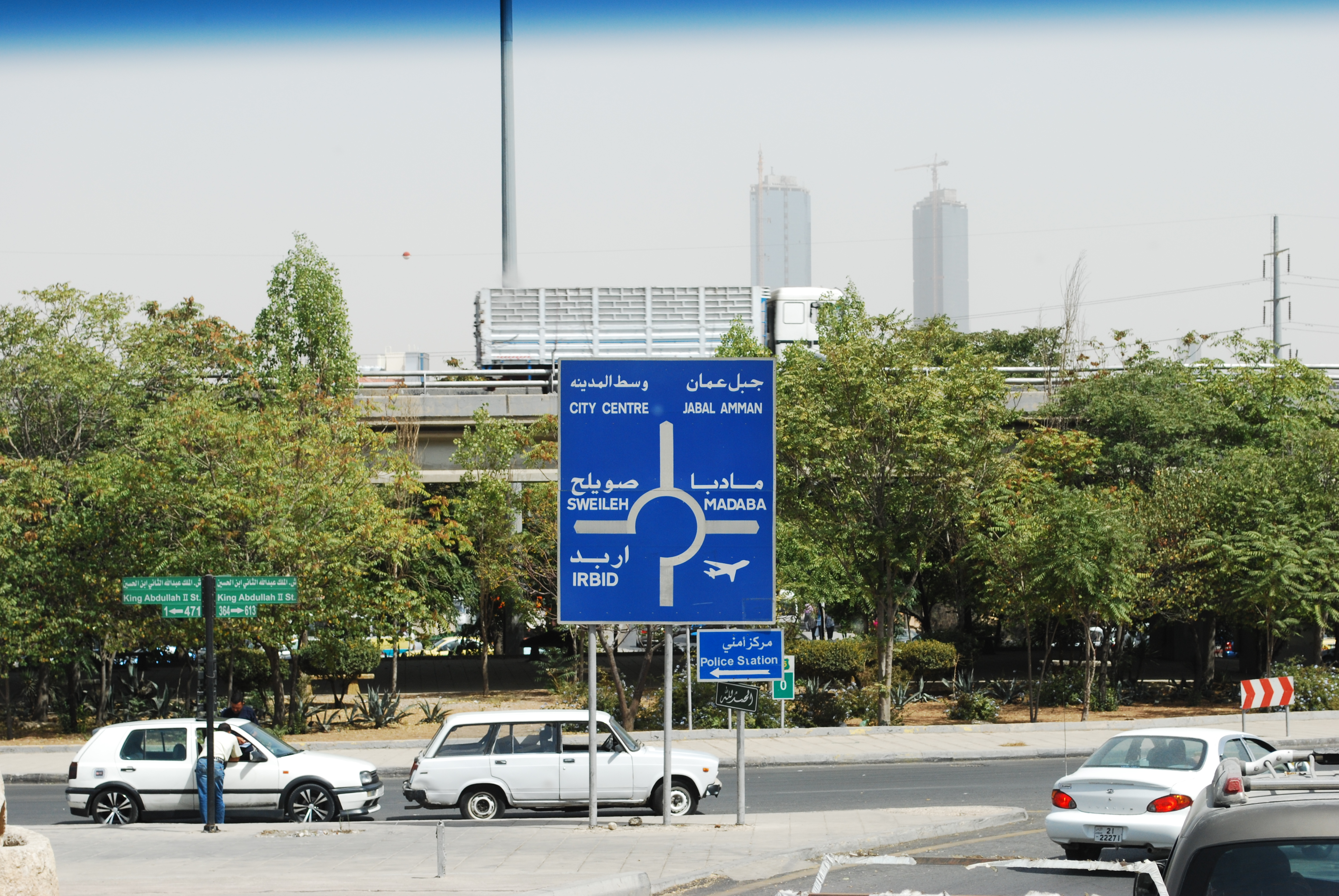 Amman : Al Bayader Street, rond-point avec King Abdallah Ben Al Hussein II Street.